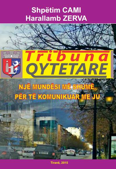 tribuna qytetare